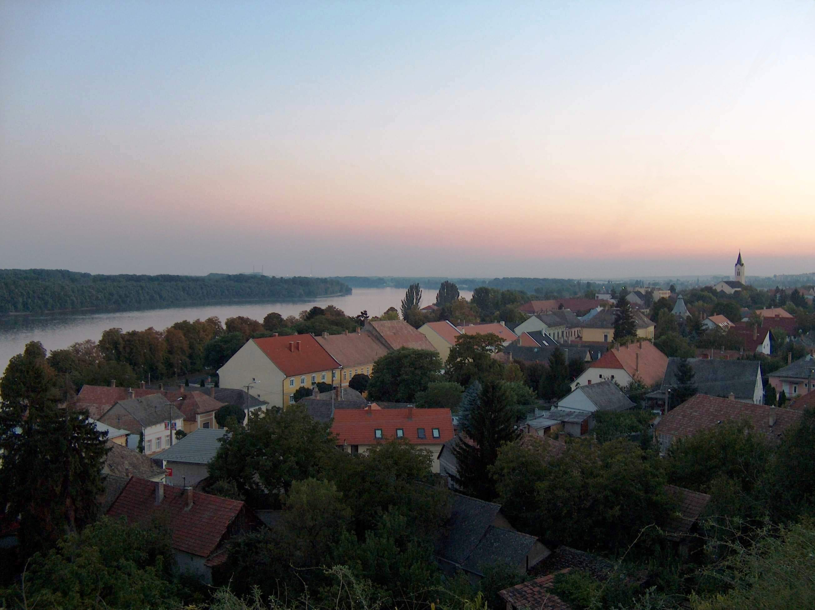 Paks